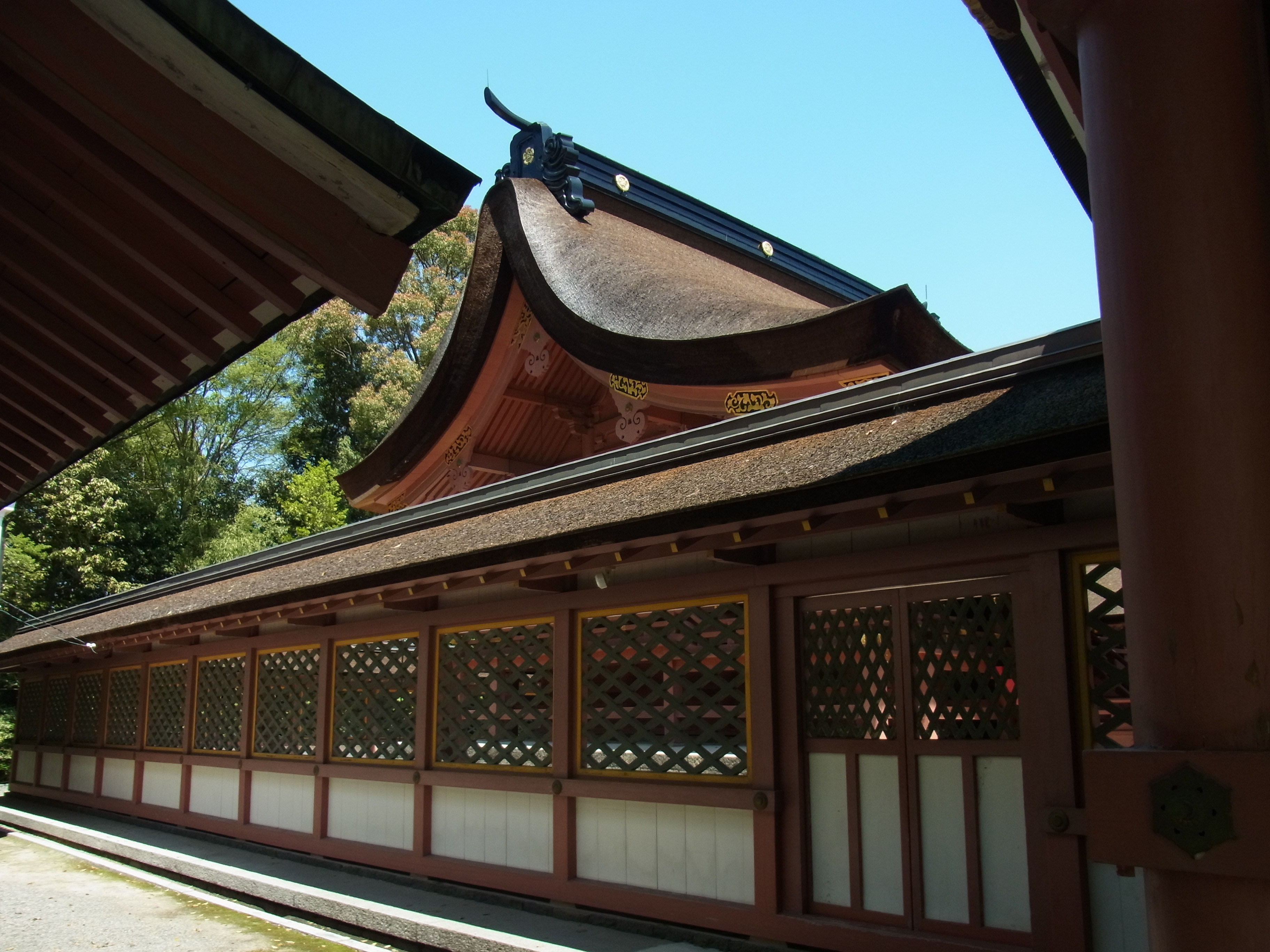 津島神社本殿